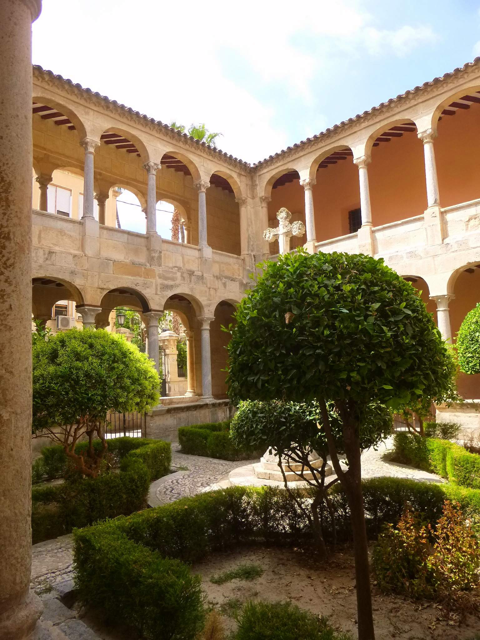 Claustro de la Catedral del Salvador de Orihuela (Alicante)